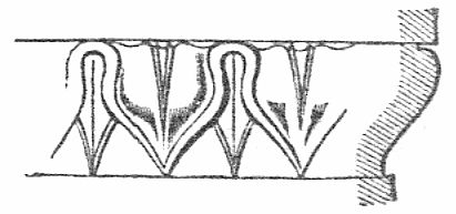 Lesbisches Kyma. Artikel Kymation in: Meyers Großes Konversations-Lexikon 6. Auflage 1905–1909